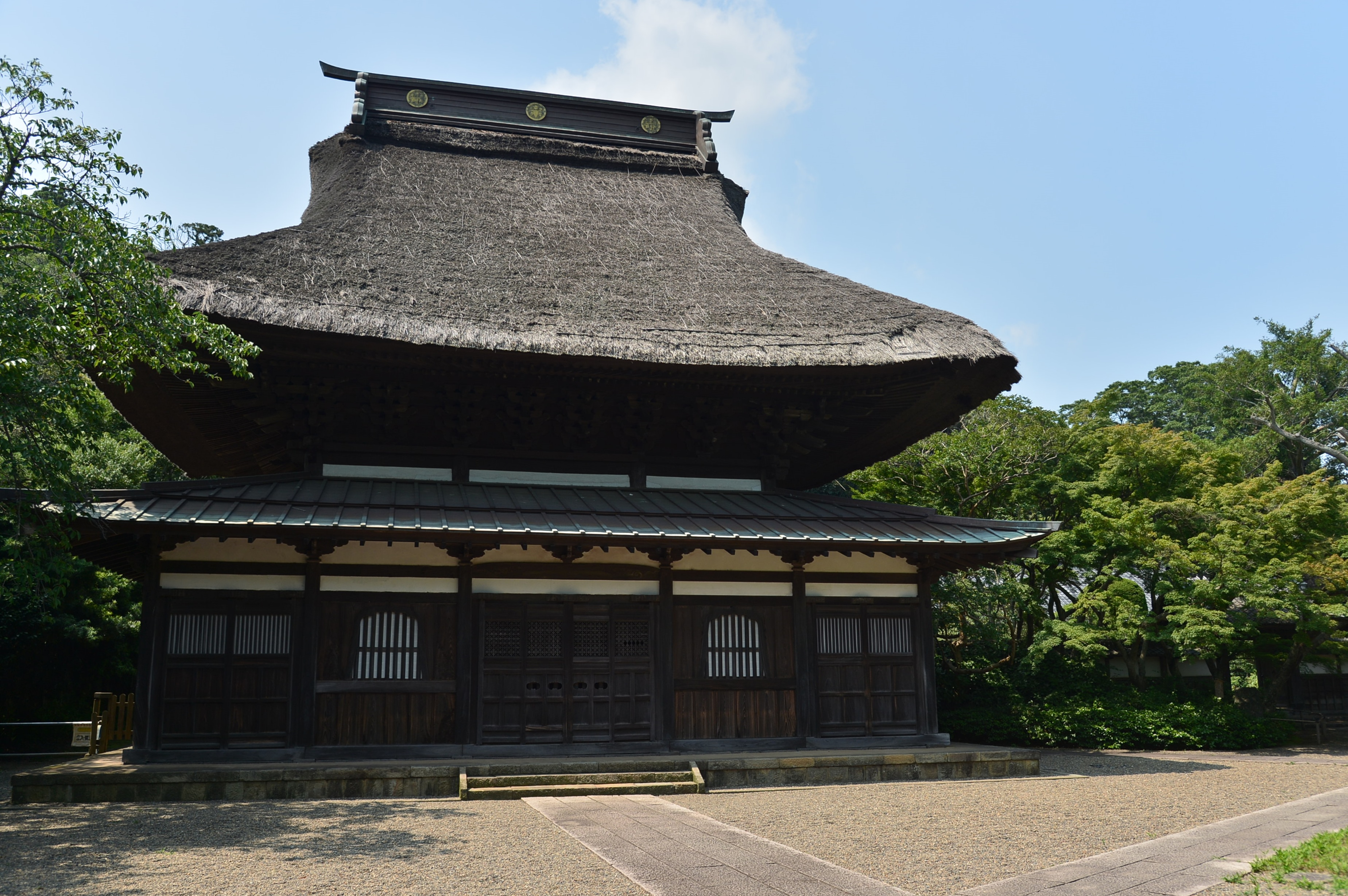 長勝寺本堂（茨城県潮来市）